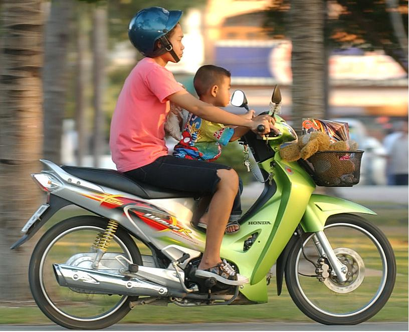 Exemple de moto (Honda, WaveR, supercub, Innova, underbone)